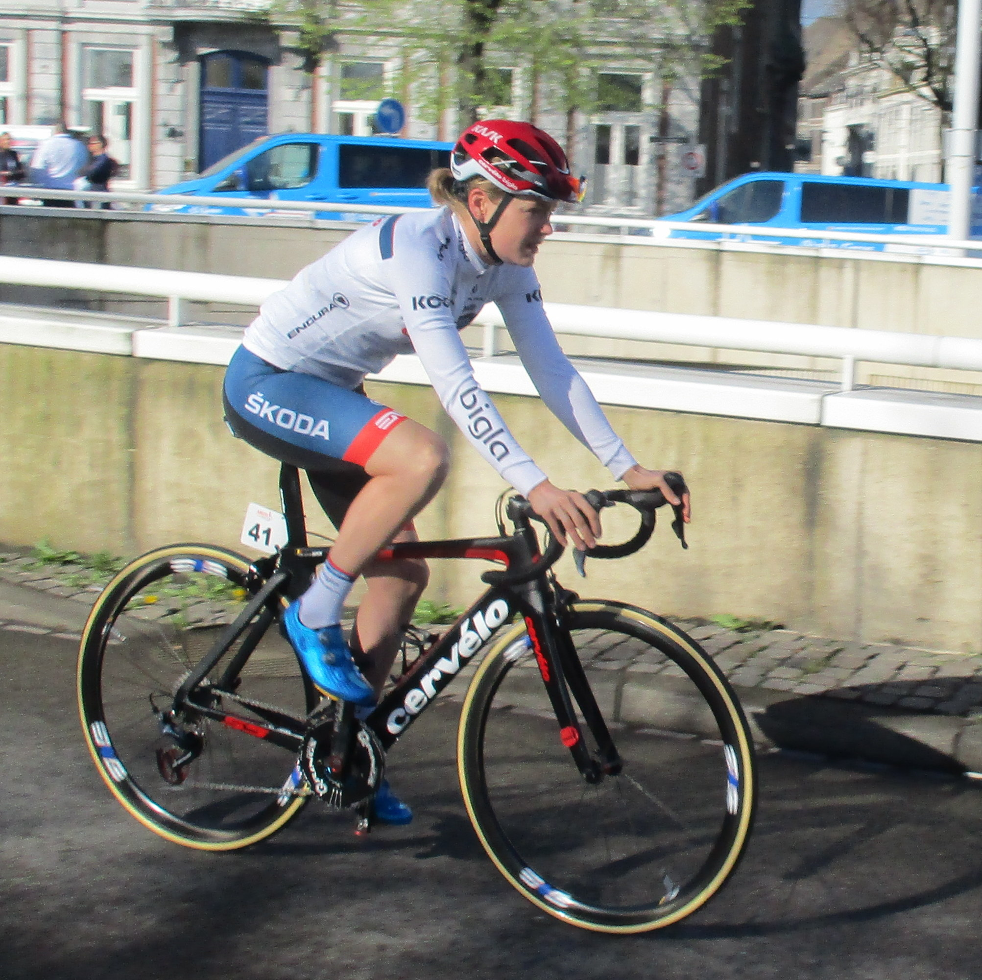 Start van de Amstel Gold Race Ladies Edition 2018 in Maastricht.